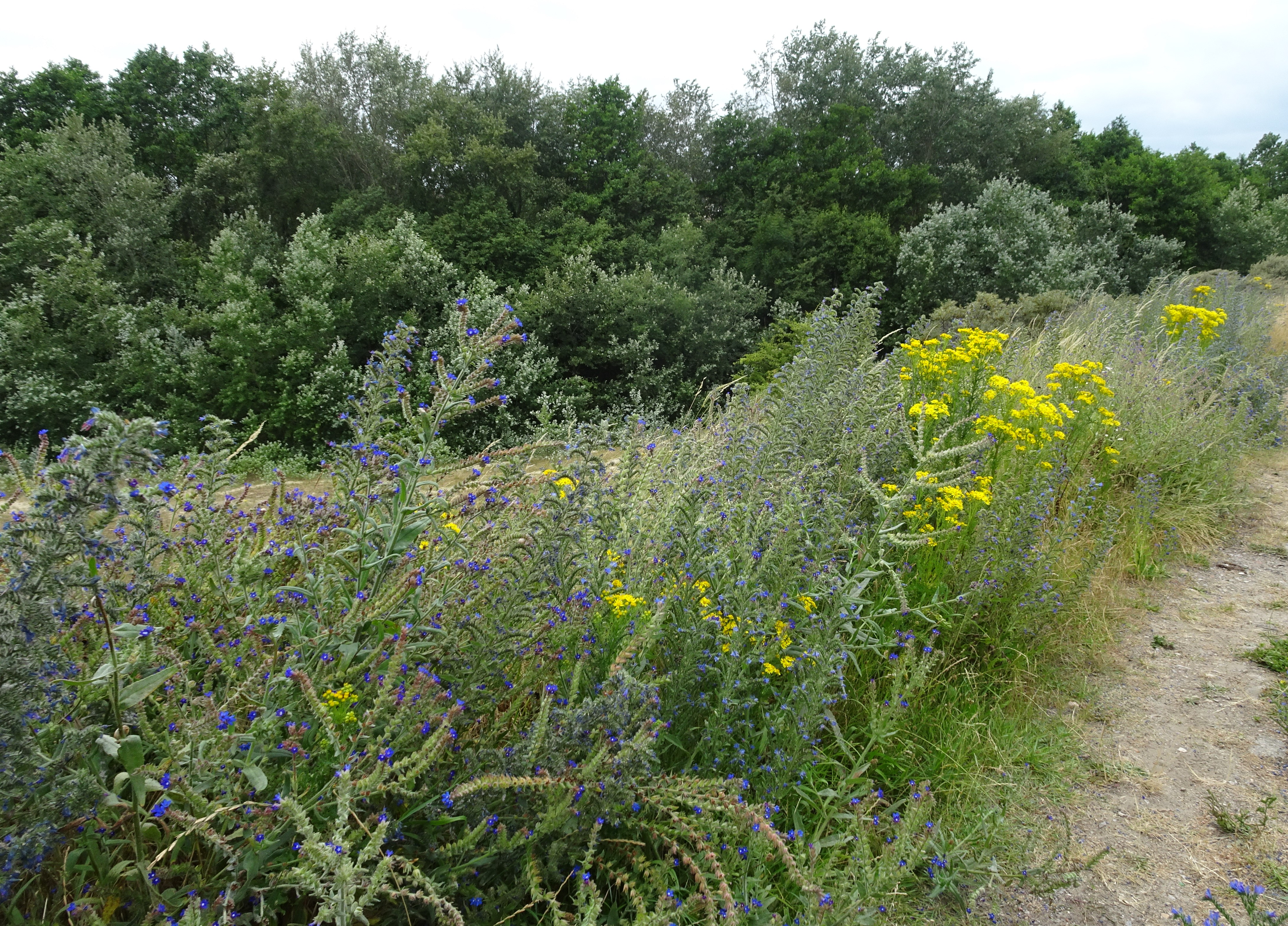 Dans les Dunes de Flandres la Réserve Naturelle de la Dune Dewulf .- Leffrinckoucke Nord